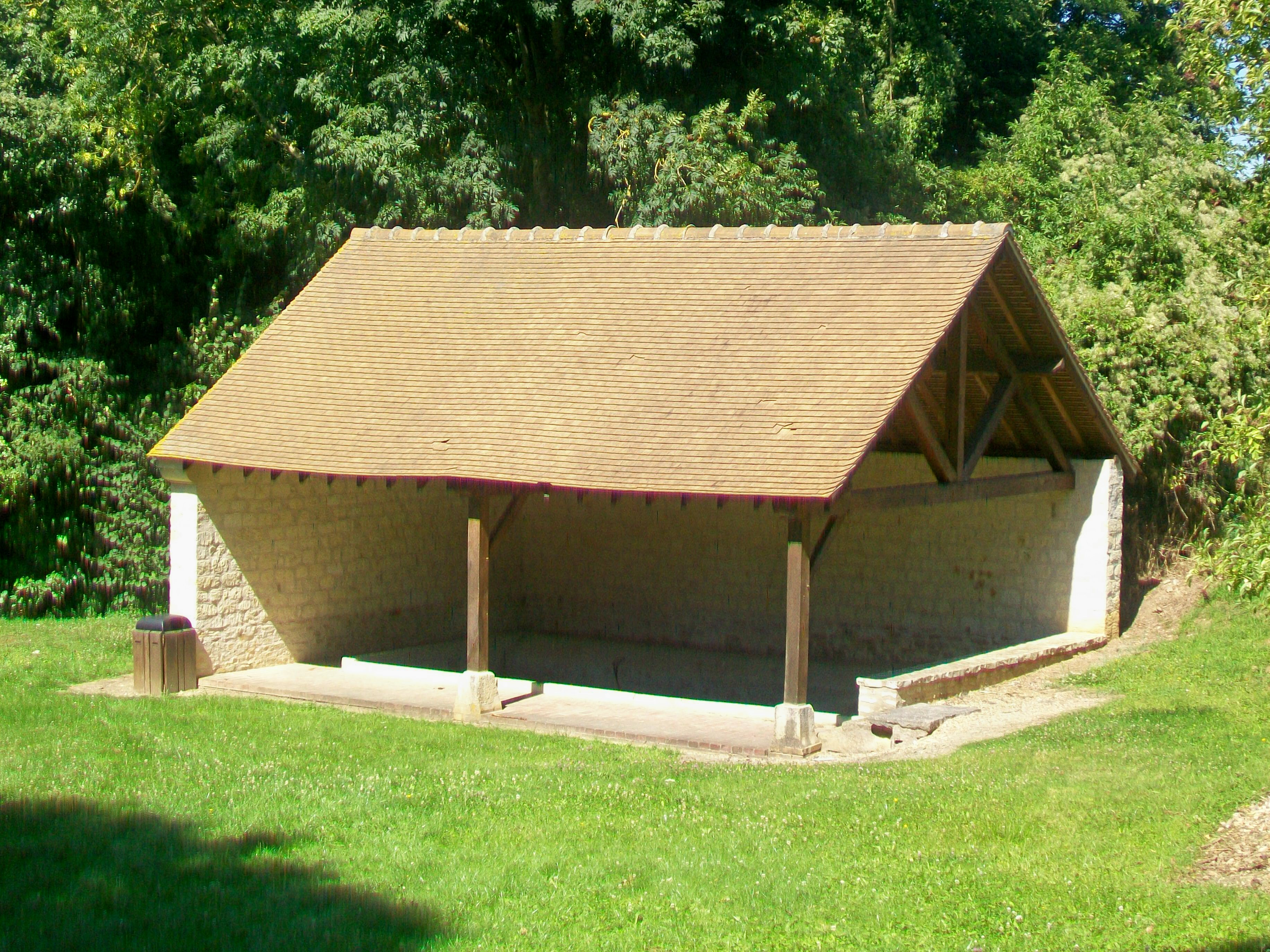 Le lavoir, au nord du village près de la mare.